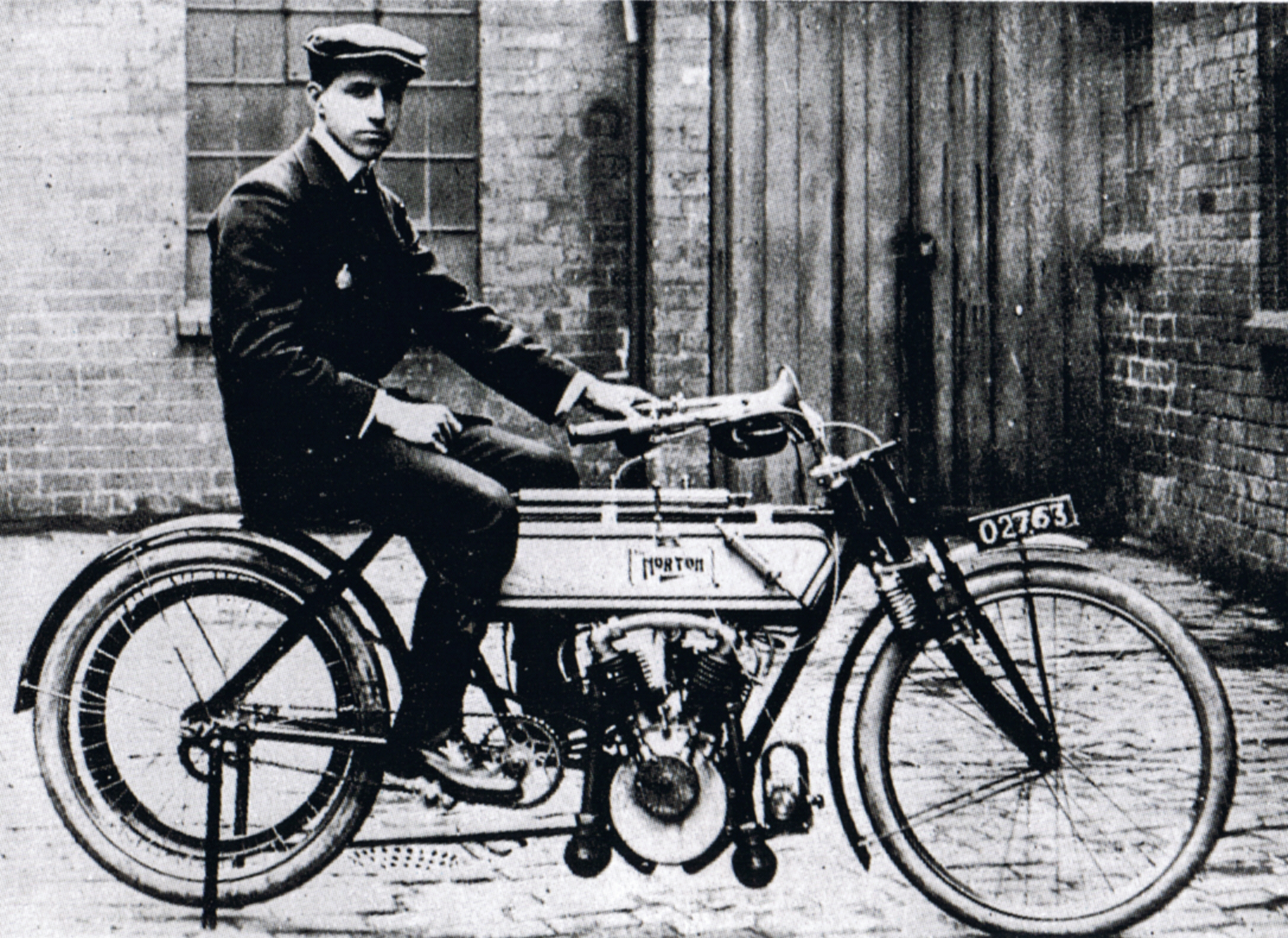 Norton mit Peugeot Motor, Rem Fowler siegte mit dieser Maschine bei der Tourist Trophy 1907 (Isle of Man TT)